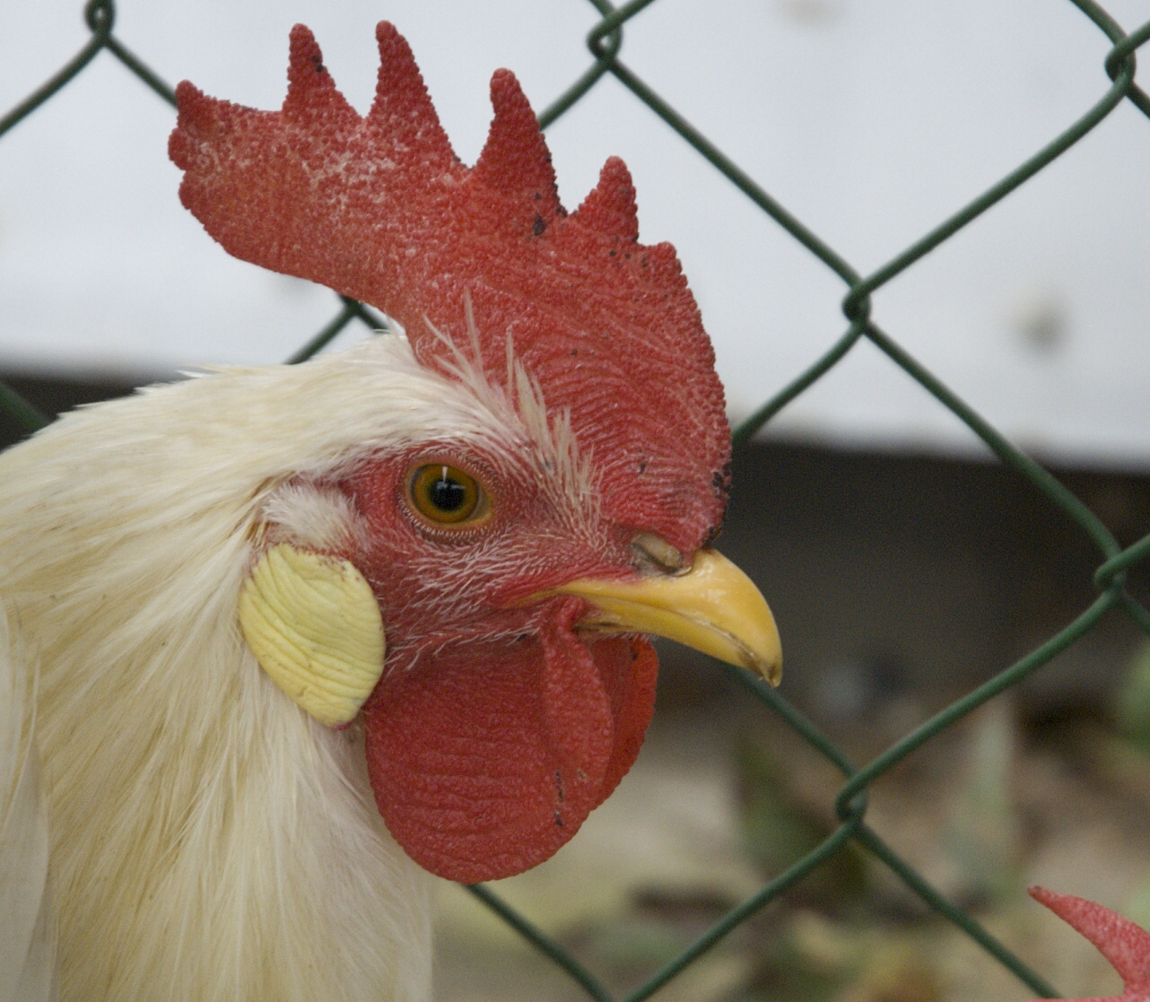 hlava kohouta leghornky